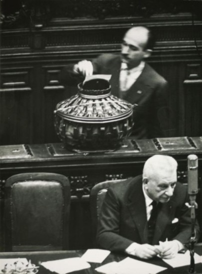 Elezione del Presidente della Repubblica Giovanni Gronchi